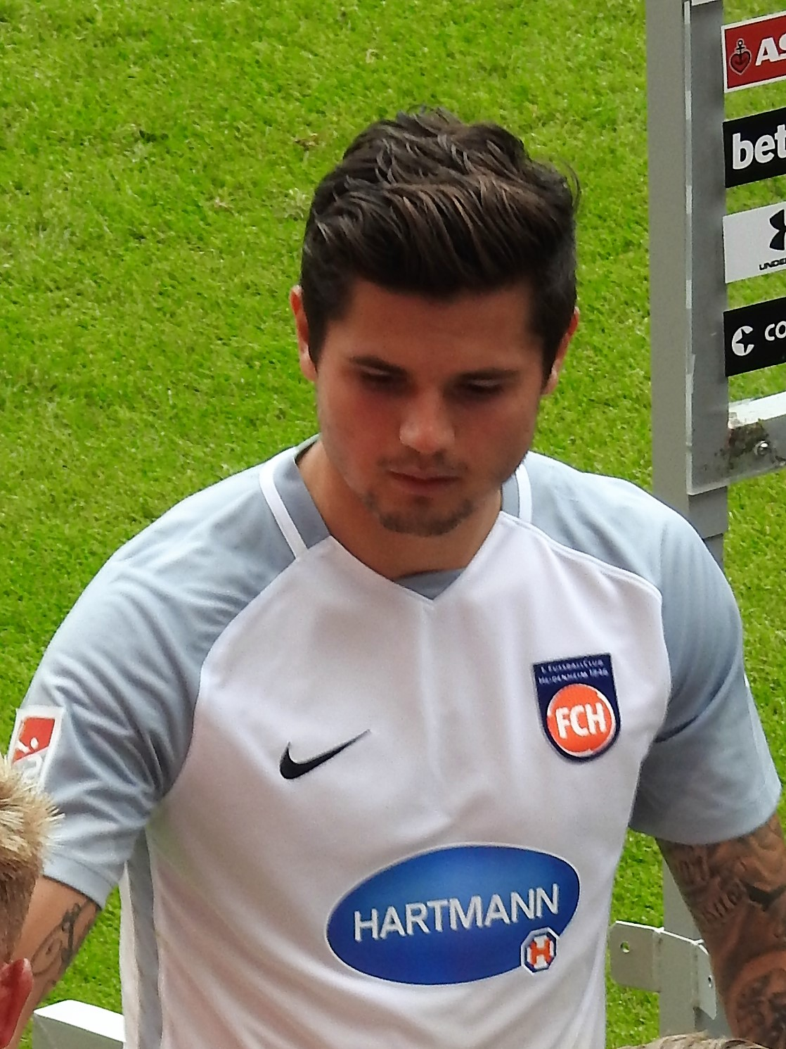 Marnon Busch Heidenheim